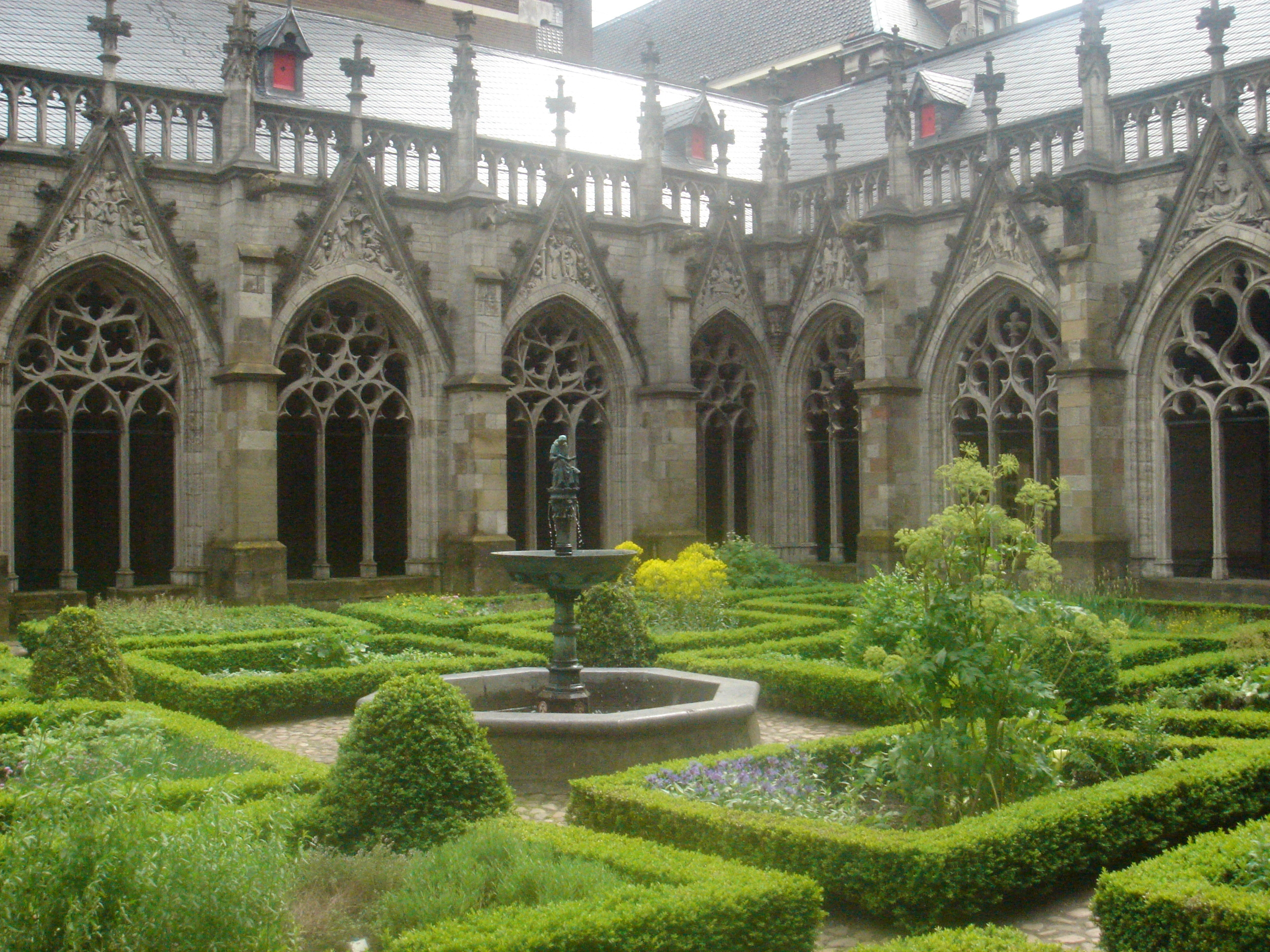 Pandhof van de Dom van Utrecht